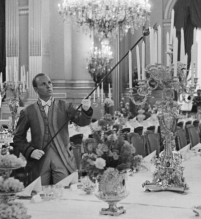 Koninklijk Paleis 1960, lakeien tijdens voorbereiding van een banket voor het Hof